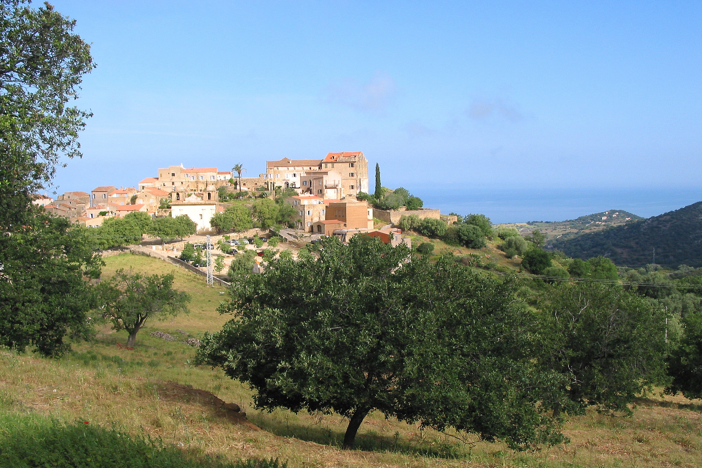 Pigna (France) - Corse du Sud, le village. Corsu: Pigna Francia ( Corsica suttana.), lu paese.